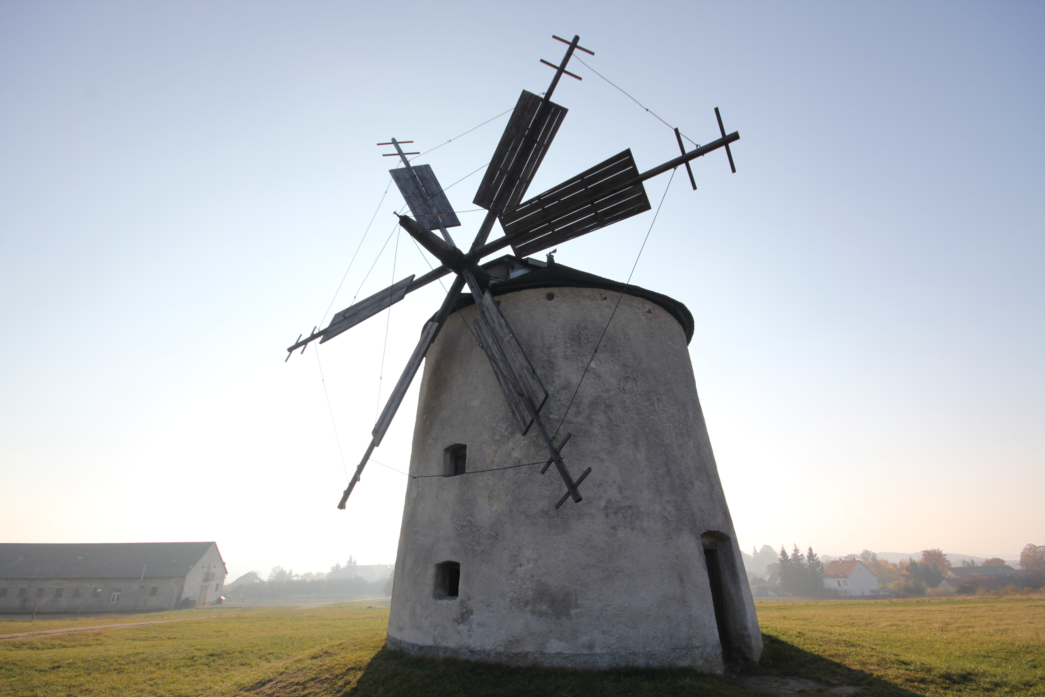 Szélmalom, Tés This is a photo of a monument in Hungary. Identifier: 10461